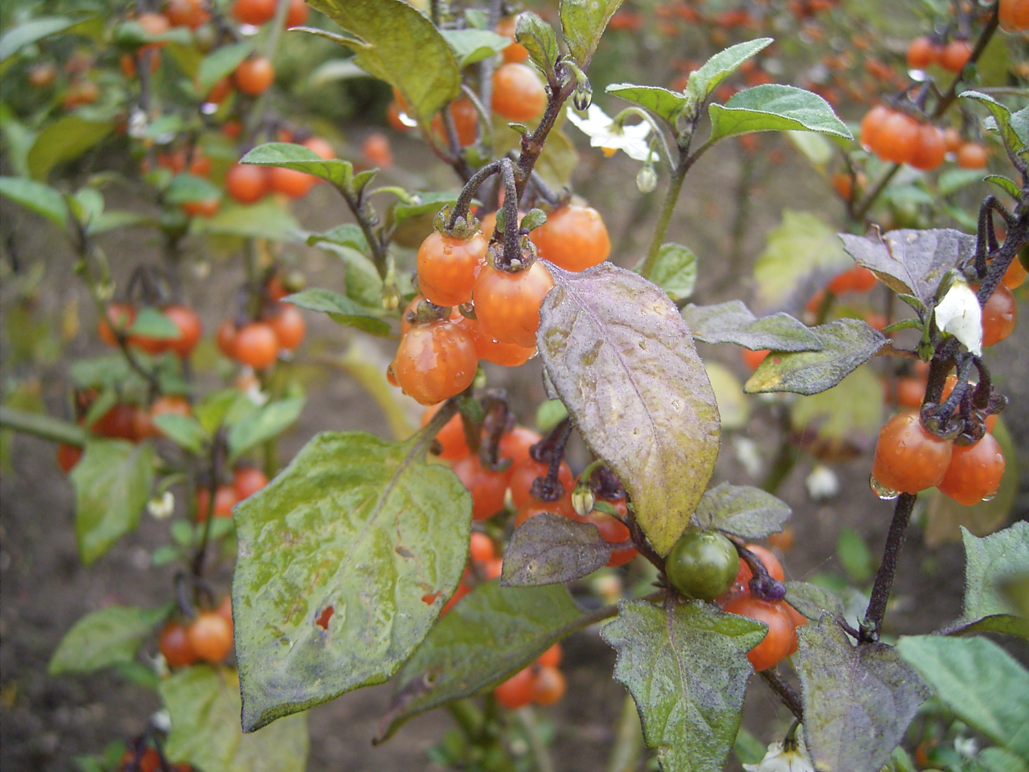 Deze foto toont de vruchten en de bladeren van de Driebloemige nachtschade. Ik nam de foto op 1 oktober 2005 in arboretum De Dreijen in Wageningen. This photo shows the fruits and the leaves of Solanum triflorum. I took the photo in arboretum De Dreijen Misidentified, not Solanum triflorum!